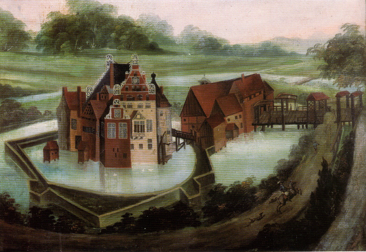 Haus Bevern nach einem Gemälde von1637